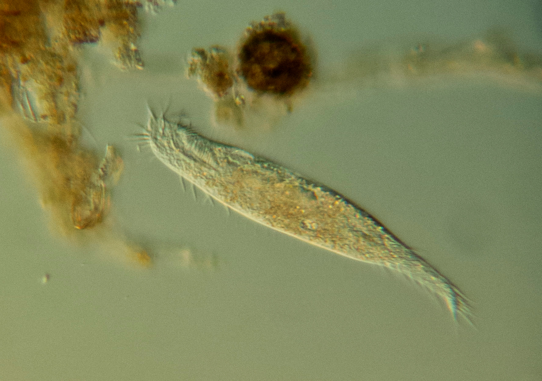 Uroleptus piscis - 160x